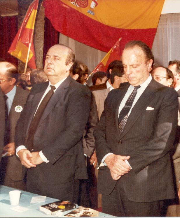 Alacant 1982. Mitin de la Coalició Popular (AP, PDP y UV). Eleccions Generals. El President nacional de AP Manuel Fraga i un del seus Vicepresidents, Juan Antonio Montesinos